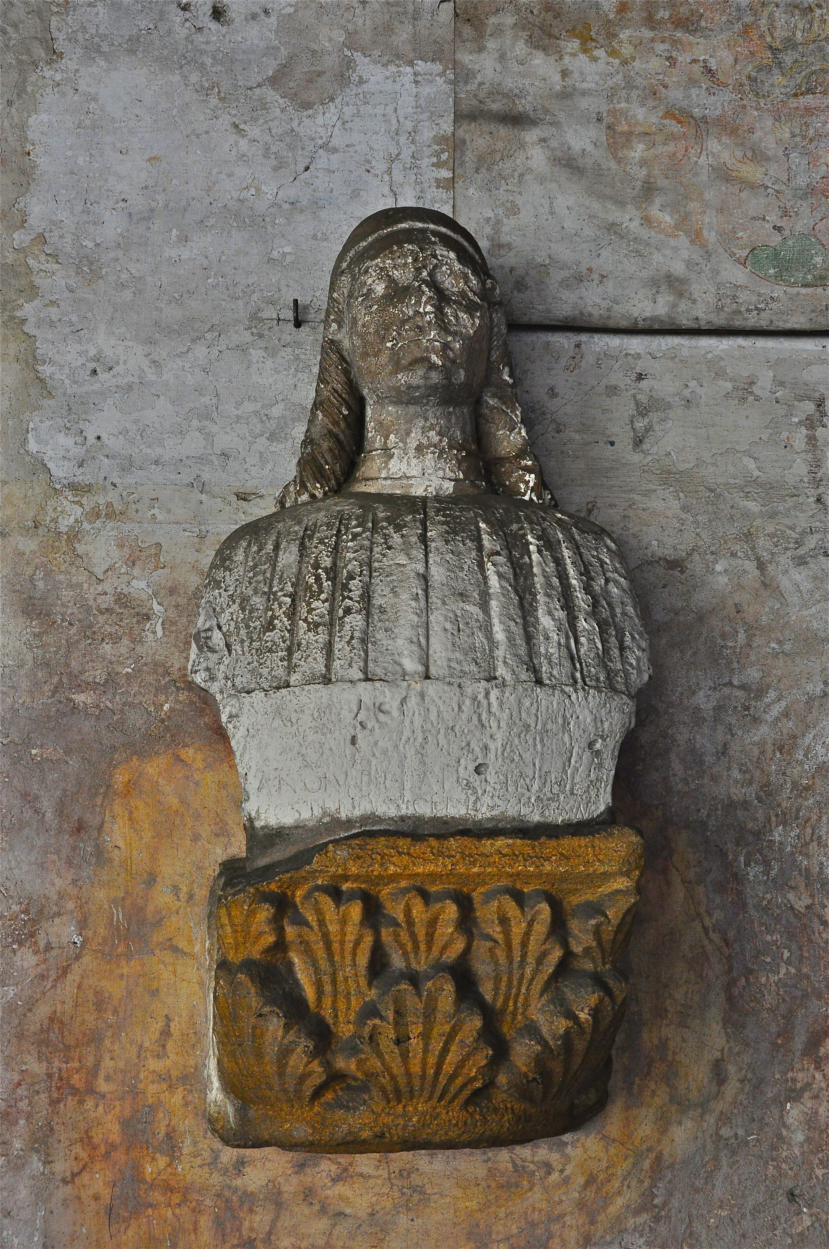 Antonio della Porta (Busto virile, 1497).